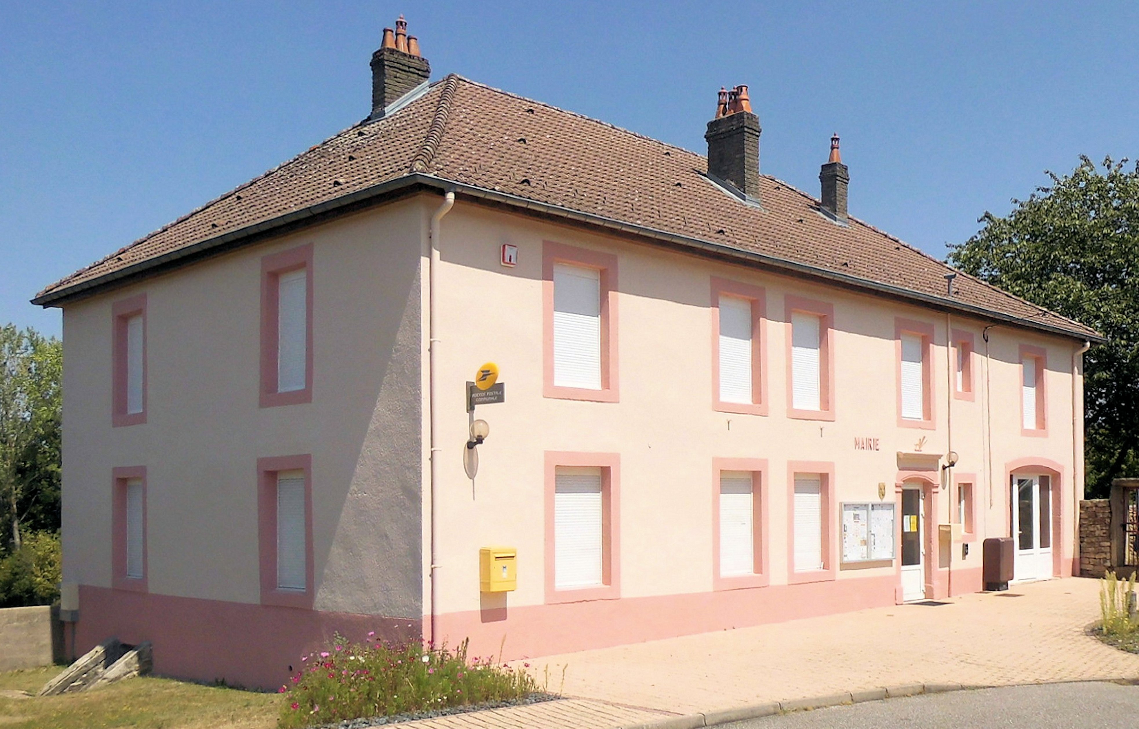 La mairie et la poste d'Hennezel